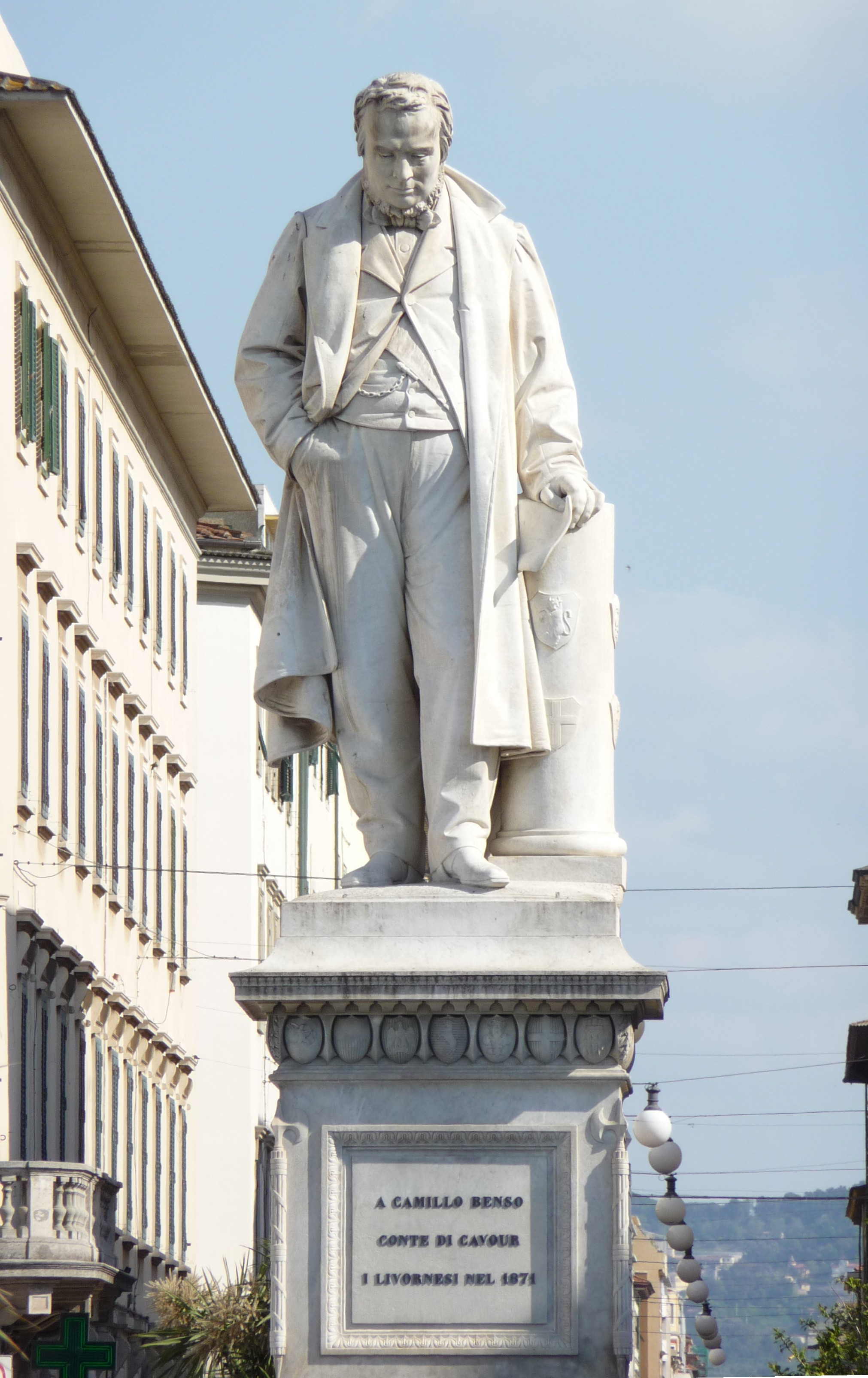 Monument for Camillo Benso, conte di Cavour, Piazza Cavour, Livorno, Italy